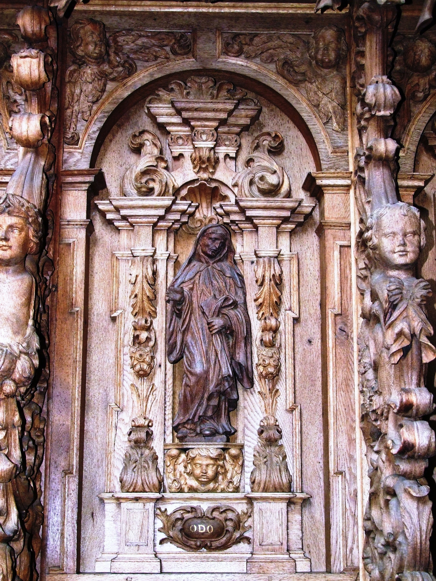 Das Chorgestühl in der Klosterkirche des ehemaligen Kartäuserklosters Buxheim: Odo von Cluny